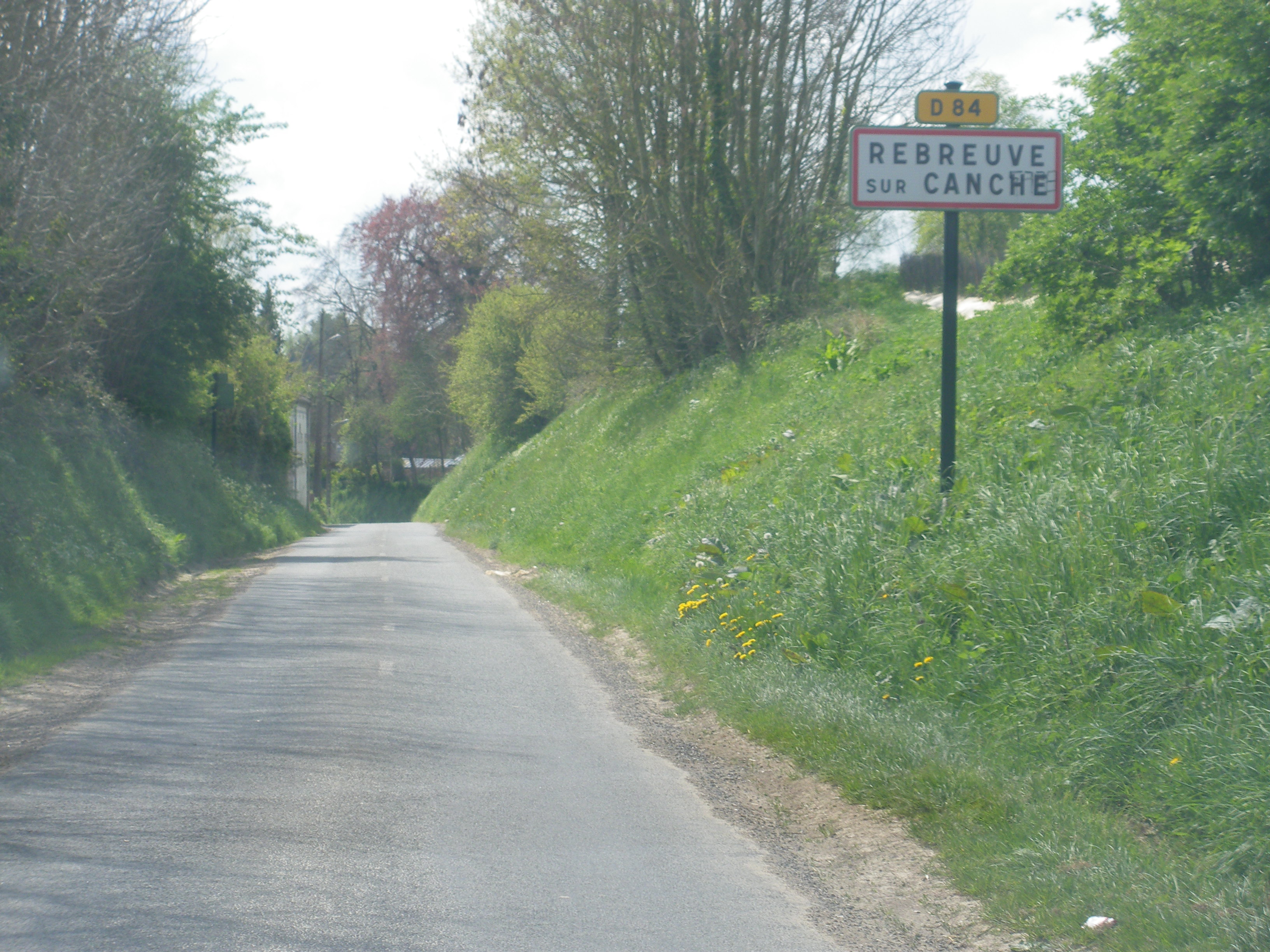 Vue d'une entrée de la commune de Rebreuve-sur-Canche.